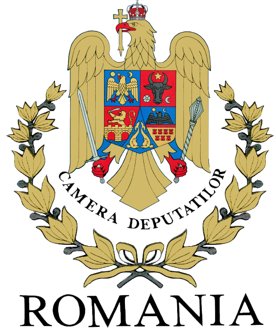 Coat of arms of the Chamber of Deputies of Romania